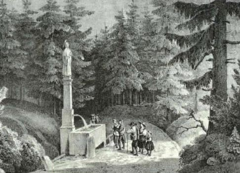 Meinradbrunnen am Etzelpass; Lithographie, Weibel Comtesse Neuchâtel 1840